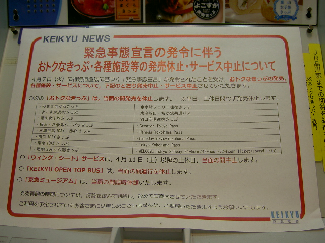 新型コロナウイルスによる外出自粛要請に伴う旅客流動減少をうけての京浜急行の切符取り扱い告知